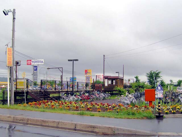 駅前広場 撮影場所 緑ヶ丘駅そば踏切